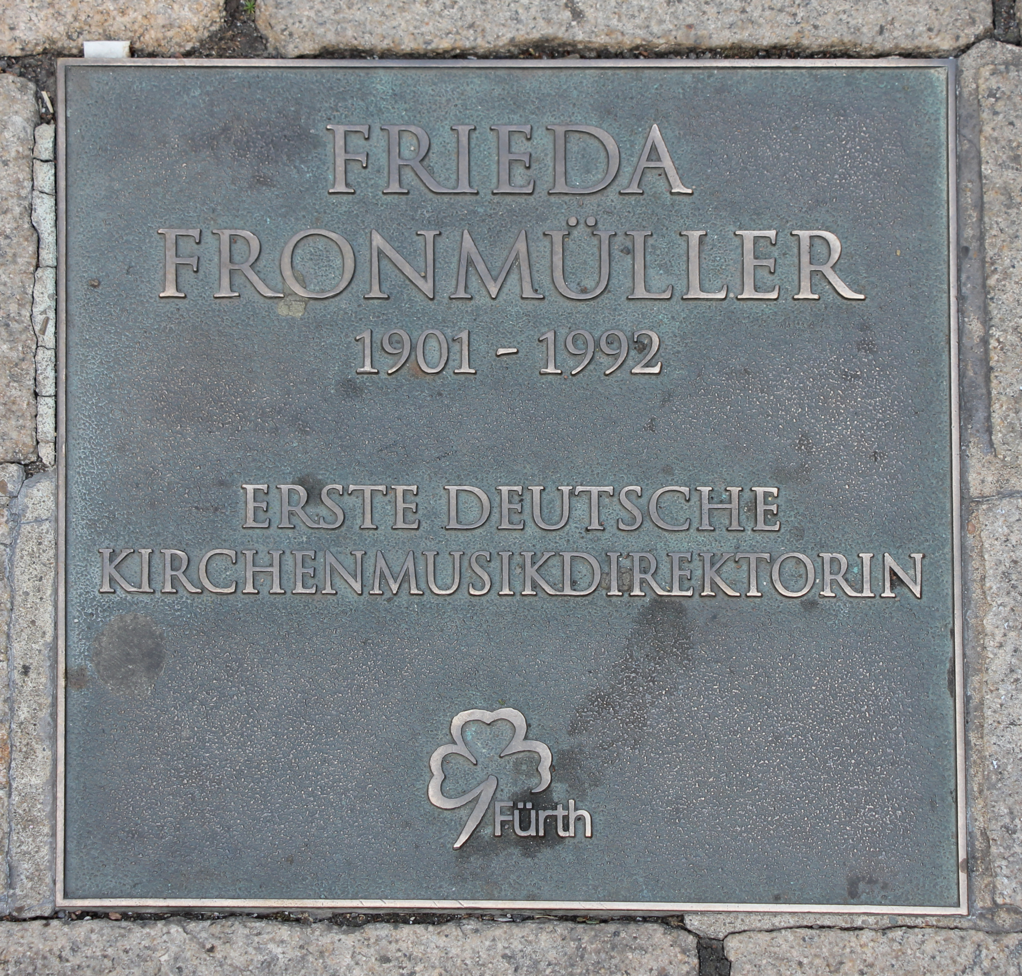 Ehrentafel für Frieda Fronmüller auf dem Ehrenweg in Fürth, Bayern